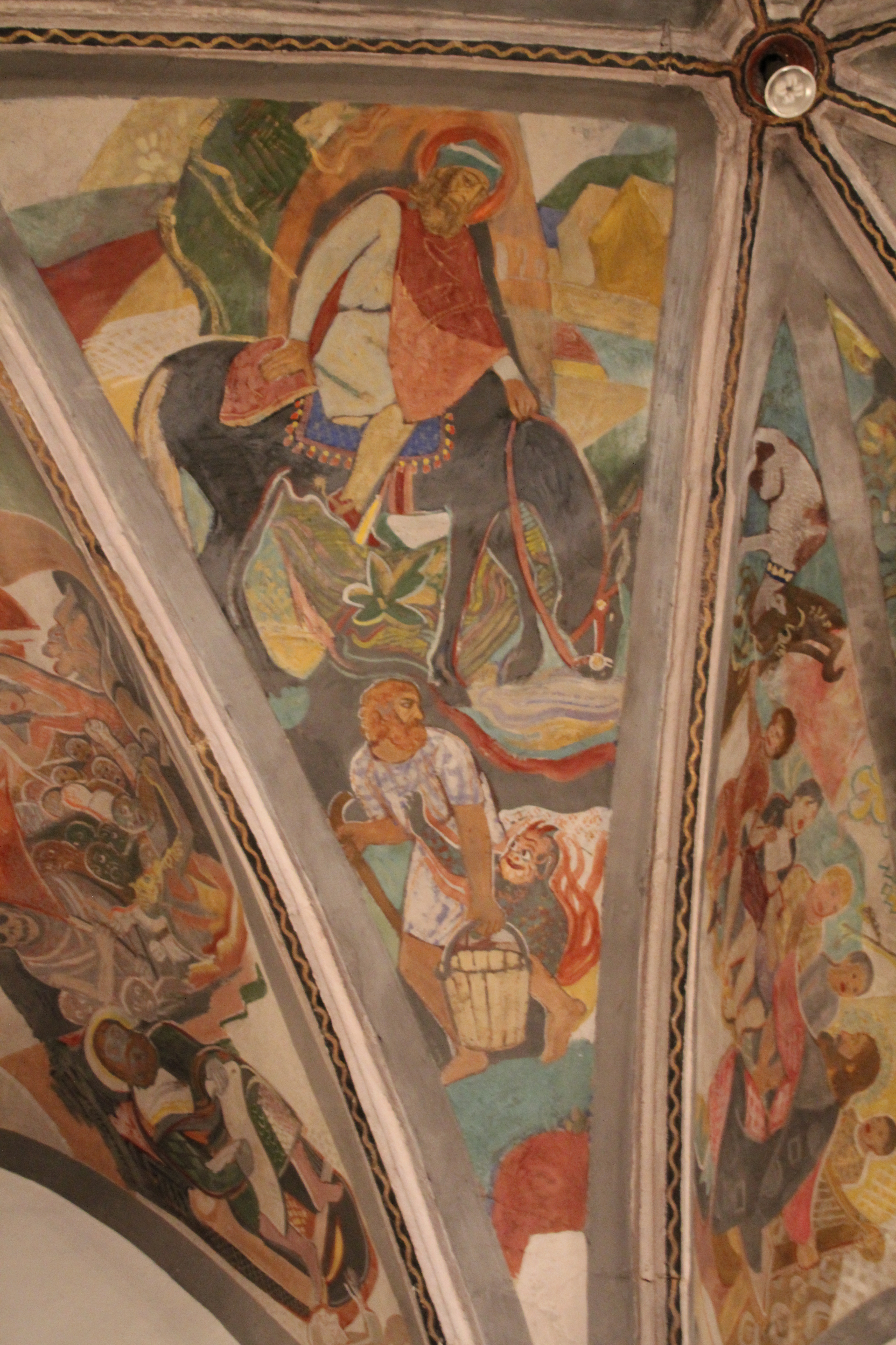 Deckengemälde "Arnold an einer Quelle" von Peter Hecker (1913/1952) in Klein St. Arnold in Arnoldsweiler.